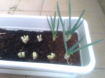 蔥